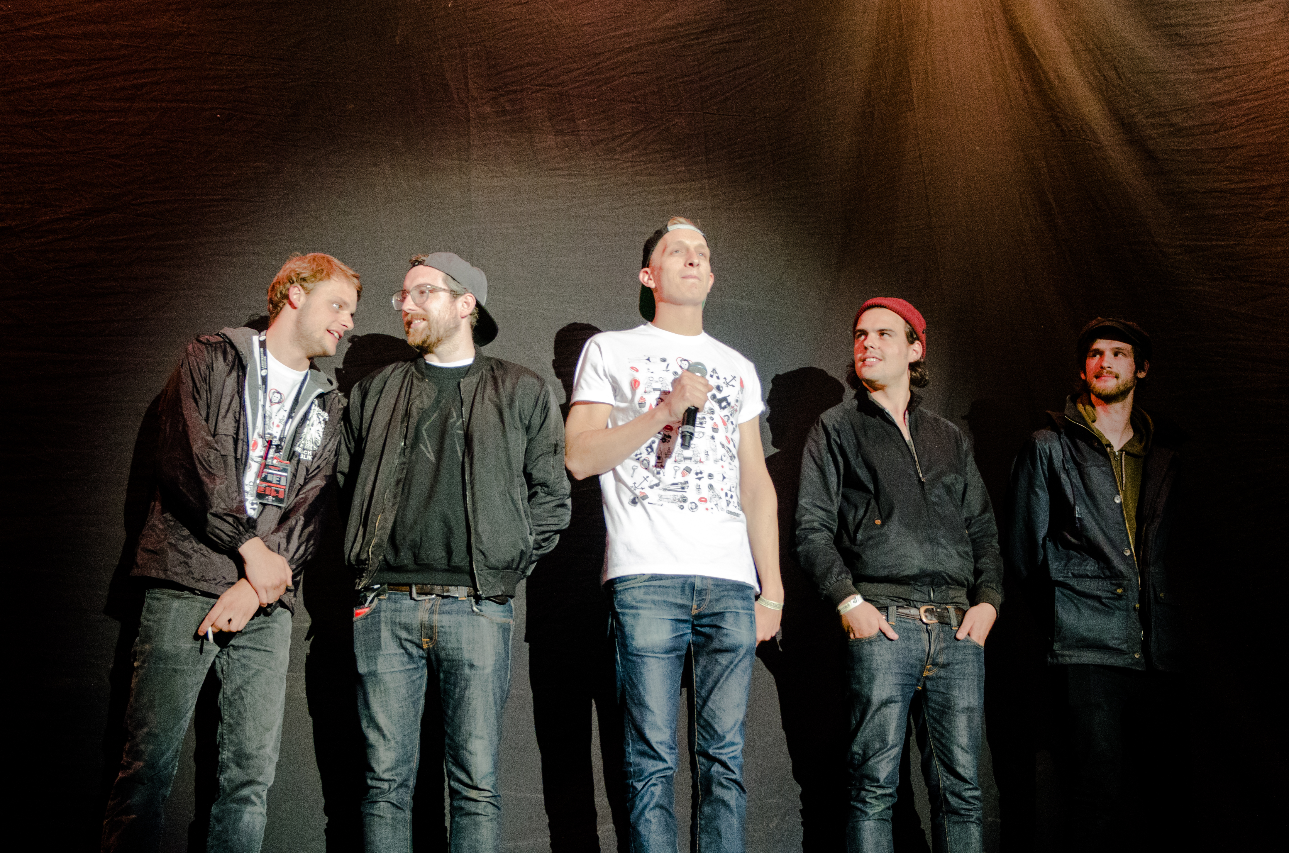 Die Band Kraftklub als Gastgeber auf dem Kosmonaut Festival.